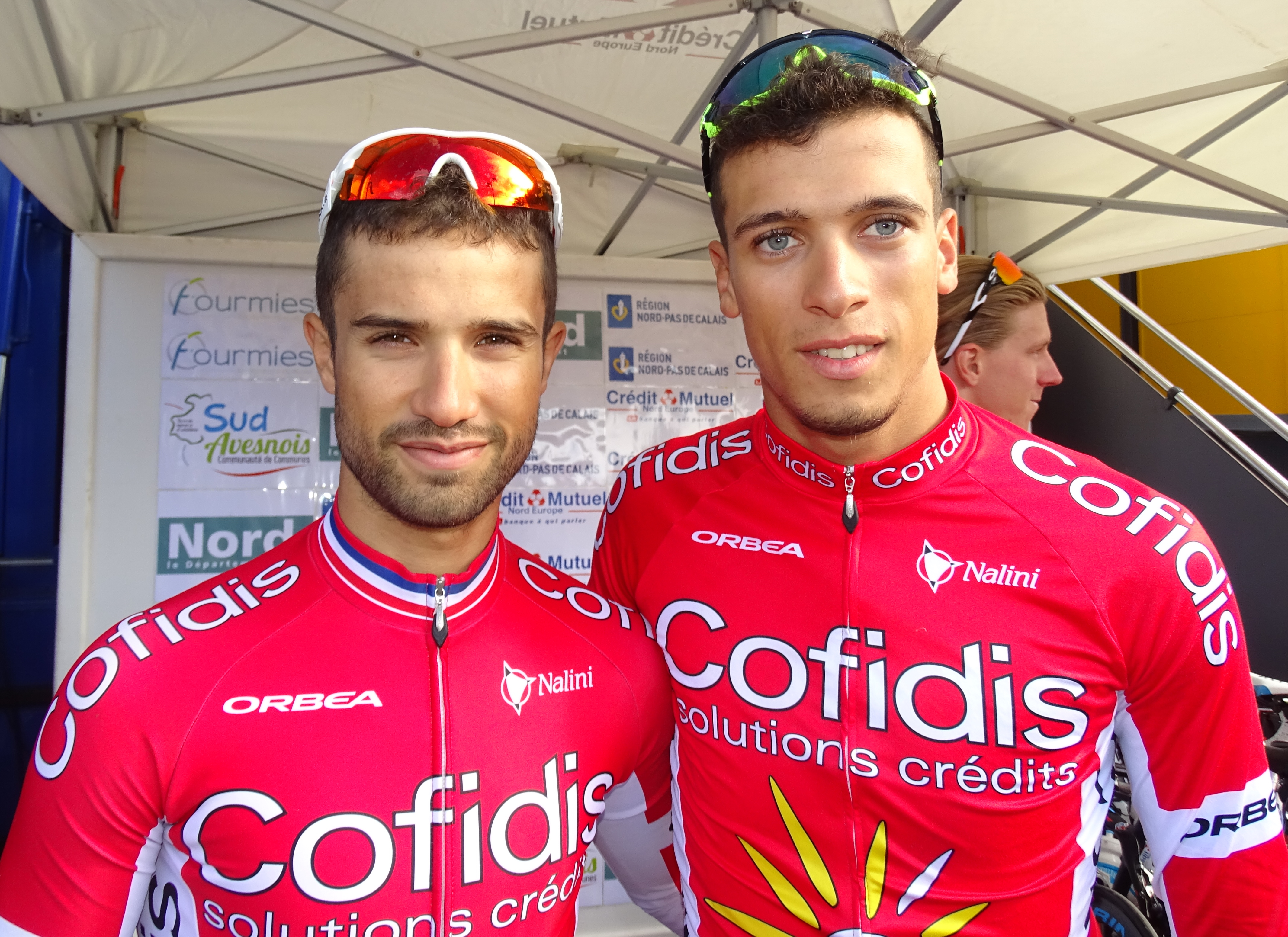 Reportage réalisé le dimanche 6 septembre à l'occasion du départ et de l'arrivée du Grand Prix de Fourmies 2015 à Fourmies, Nord-Pas-de-Calais, France.